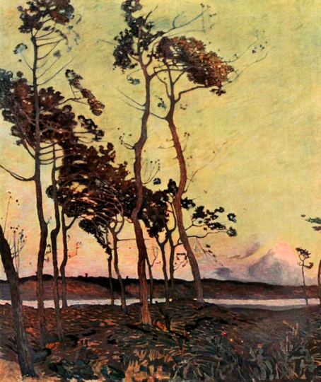 Florence Esté (1860-1926)'s painting La Baie de l'Orne, ca. 1911.